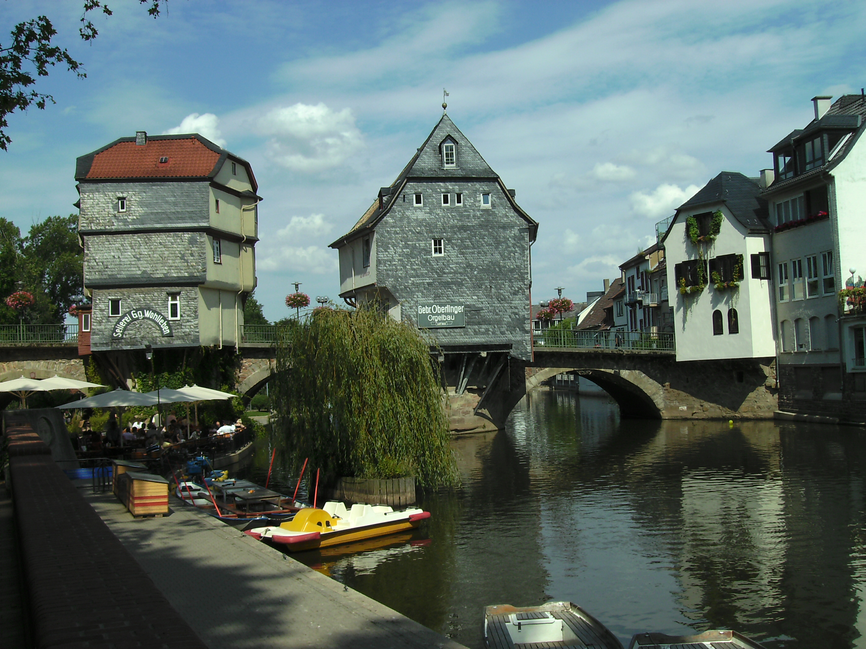 Bad Kreuznach: Nahebrückee